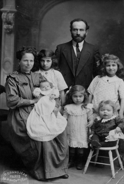 Famille de Fanny Beznos prise en 1914 par Pierre Grandjean, photographe à Paris ayant débuté son activité en 1862